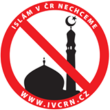 Oficiální logo Islám v České republice nechceme